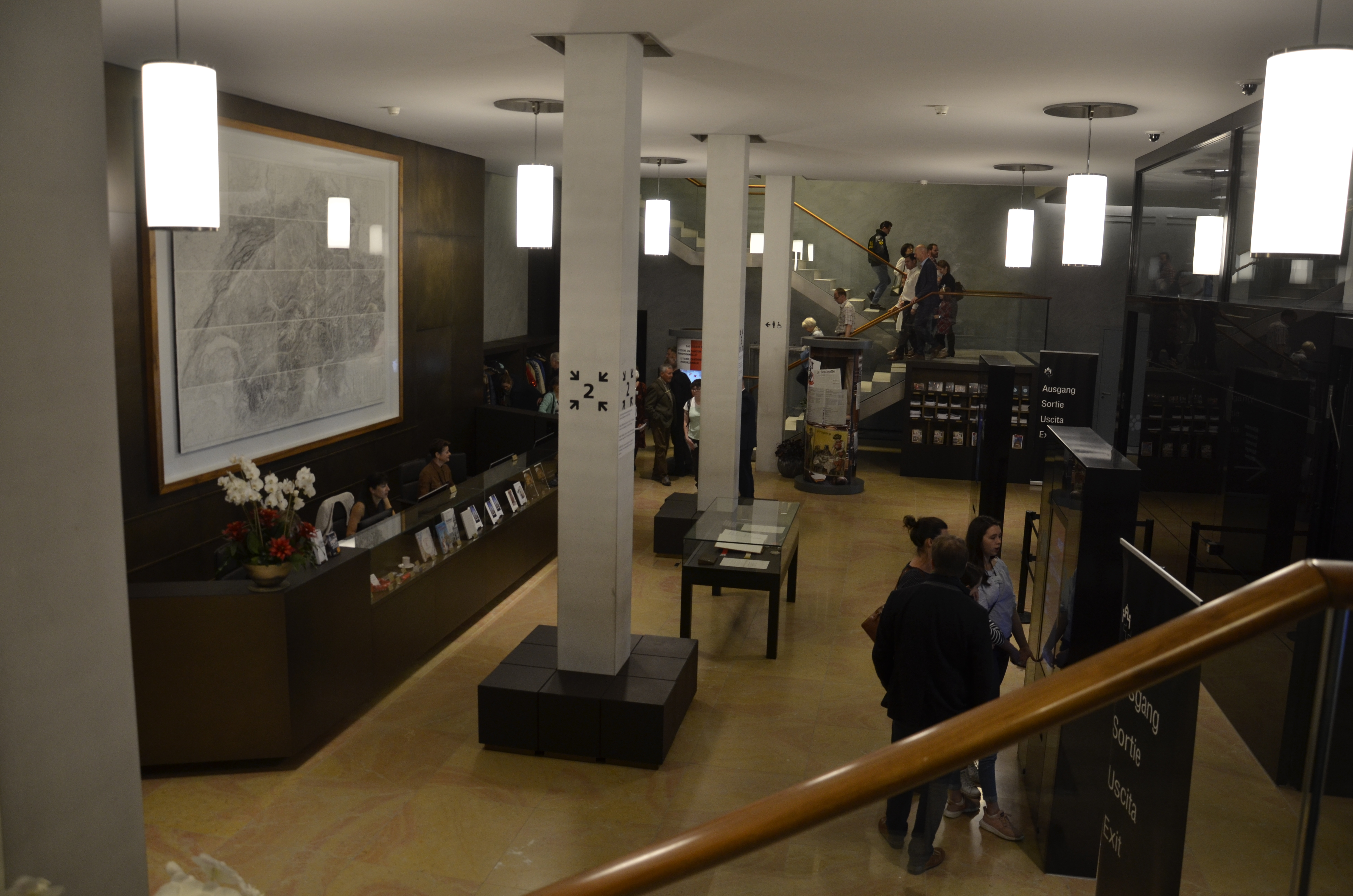 Bundeshaus Bern: der Besuchereingang nach dem Umbau im Sommer 2019. Bereich nach der Sicherheitskontrolle.